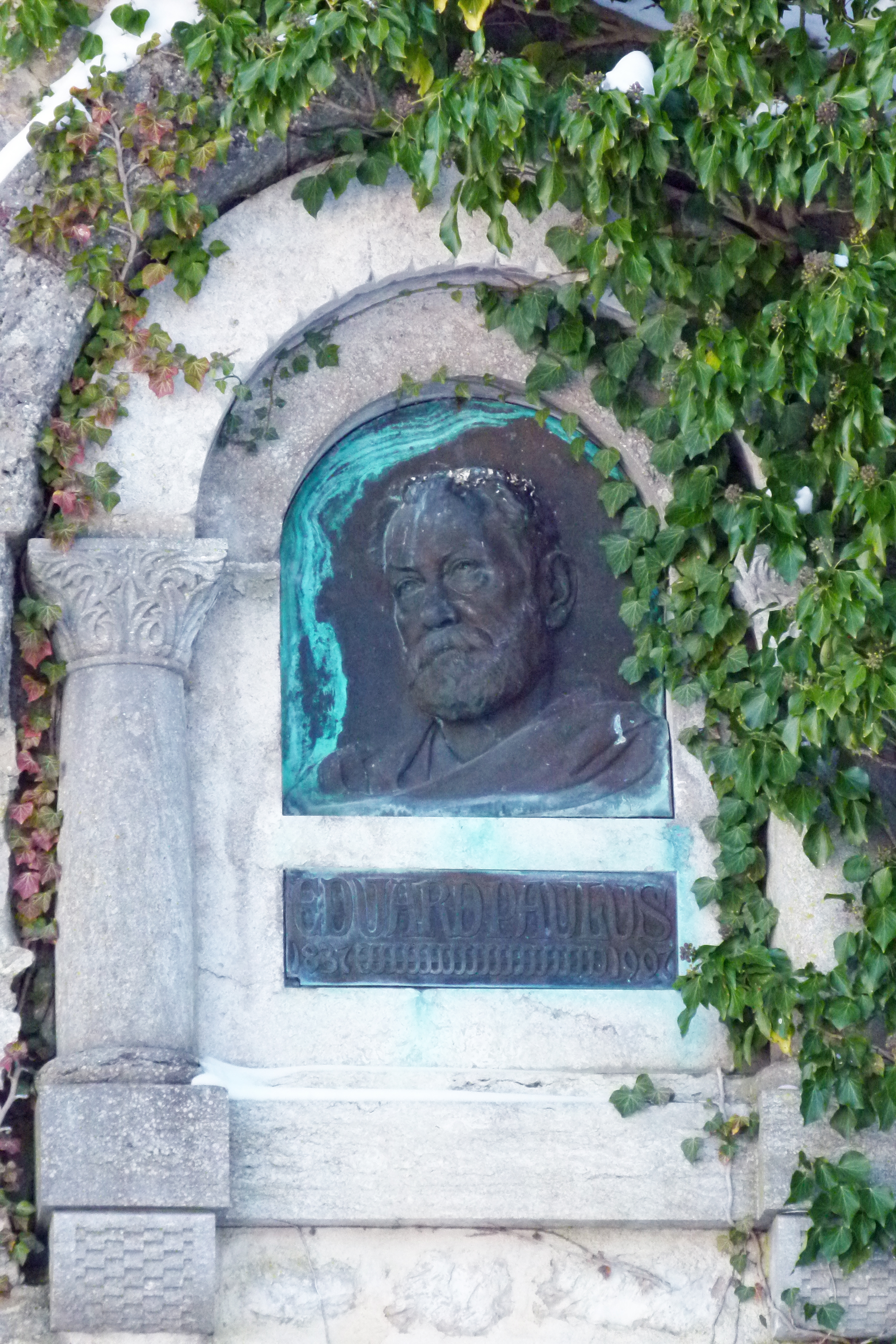 Denkmal für Eduard Paulus den Jüngeren auf dem Hohenneuffen. Für Paulus war der Hohenneuffen ein Lieblingsort, scherzhaft bekam er den Übernamen der Alte vom Hohenneuffen. 1909 wurde auf dem Hohenneuffen diese Gedenktafel, geschaffen von Georg Rheineck in neuromanischen Formen, angebracht.